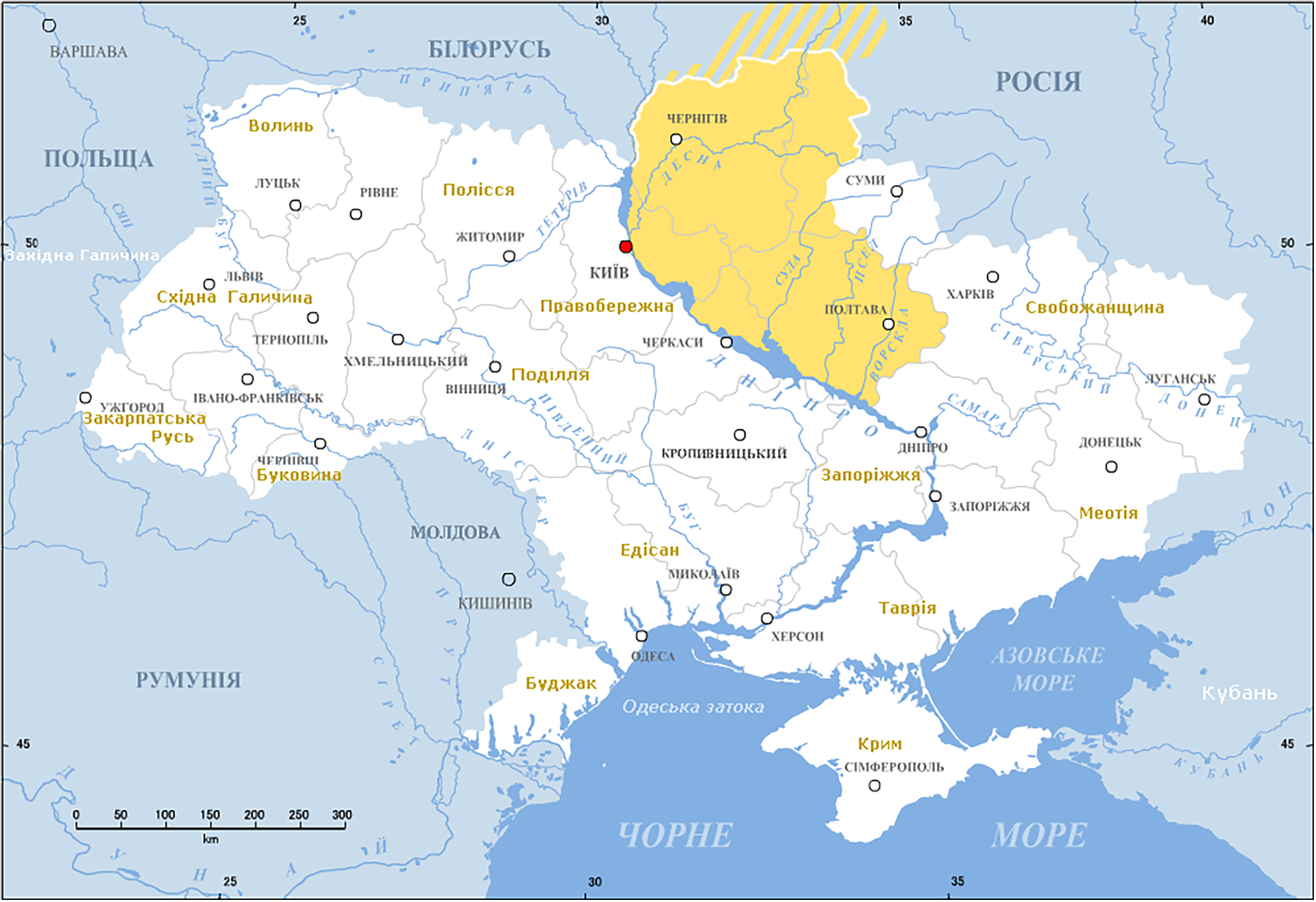 Лівобережжя